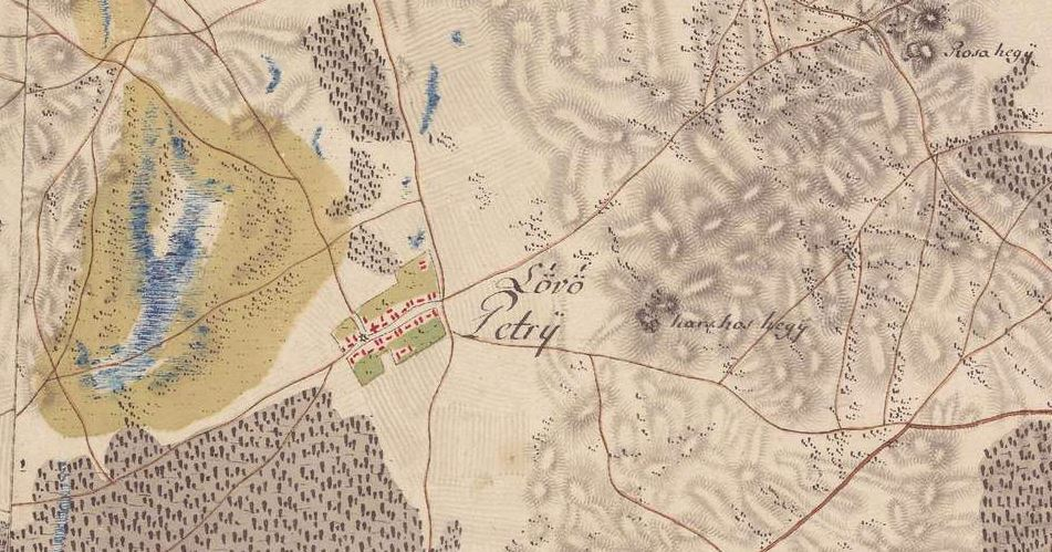 Lövőpetri 1770 környékén